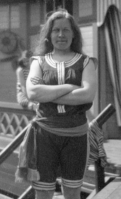 Elsa Regnell